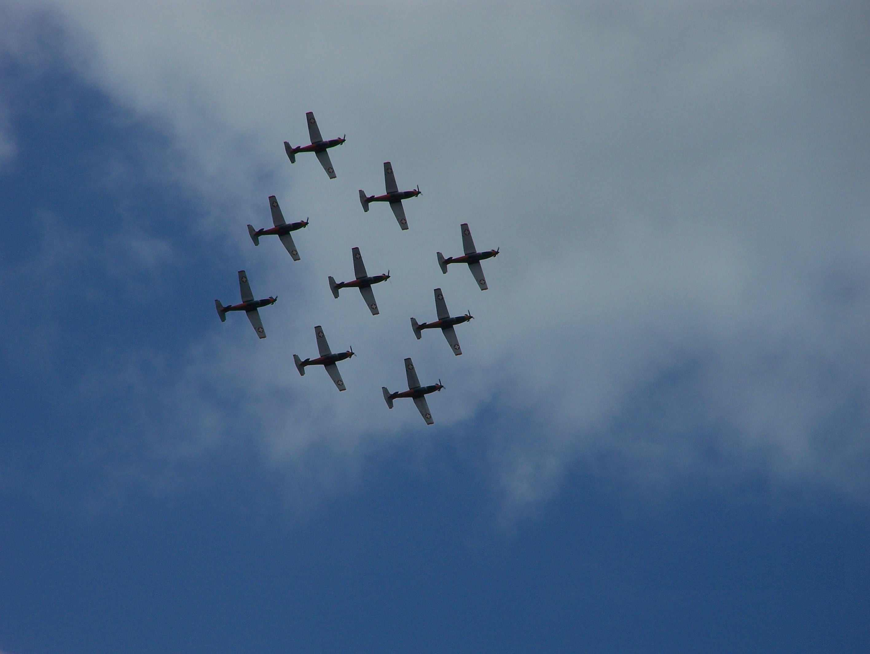 La PC-7 Team en diamant